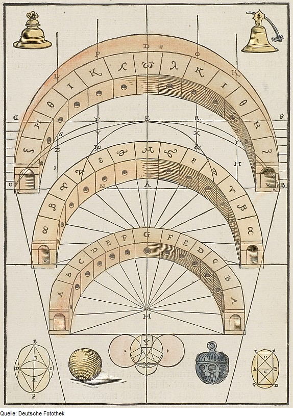 Original image description from the Deutsche Fotothek Mathematik & Geometrie & Schallgefäß & Glocke